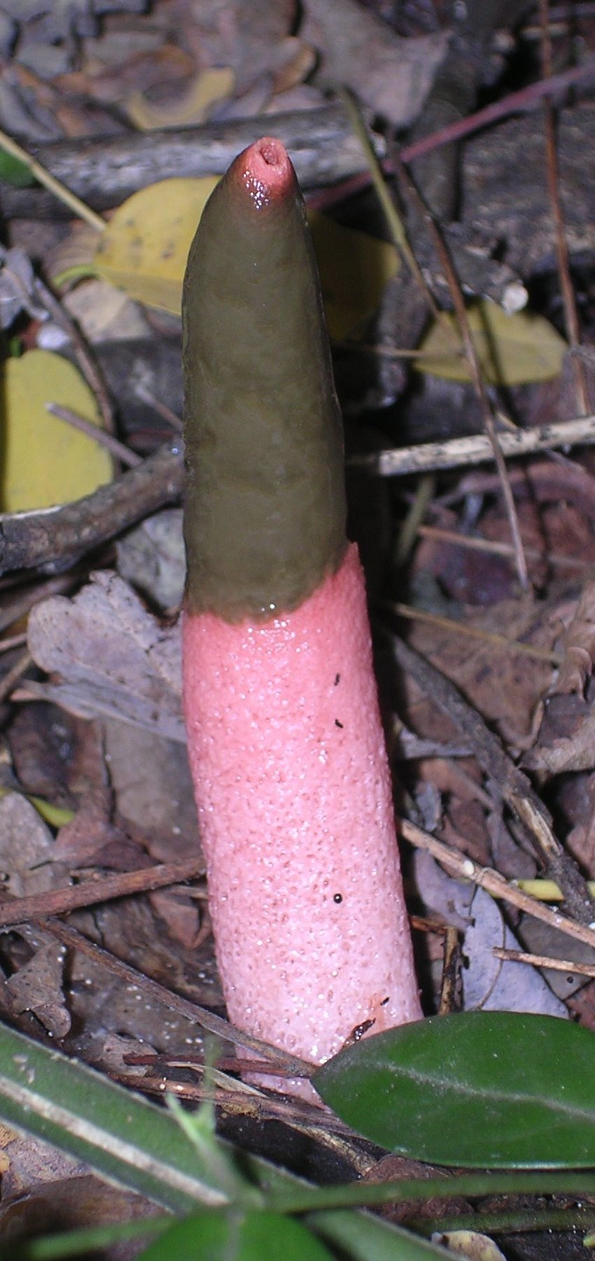 Mutinus ravenelii